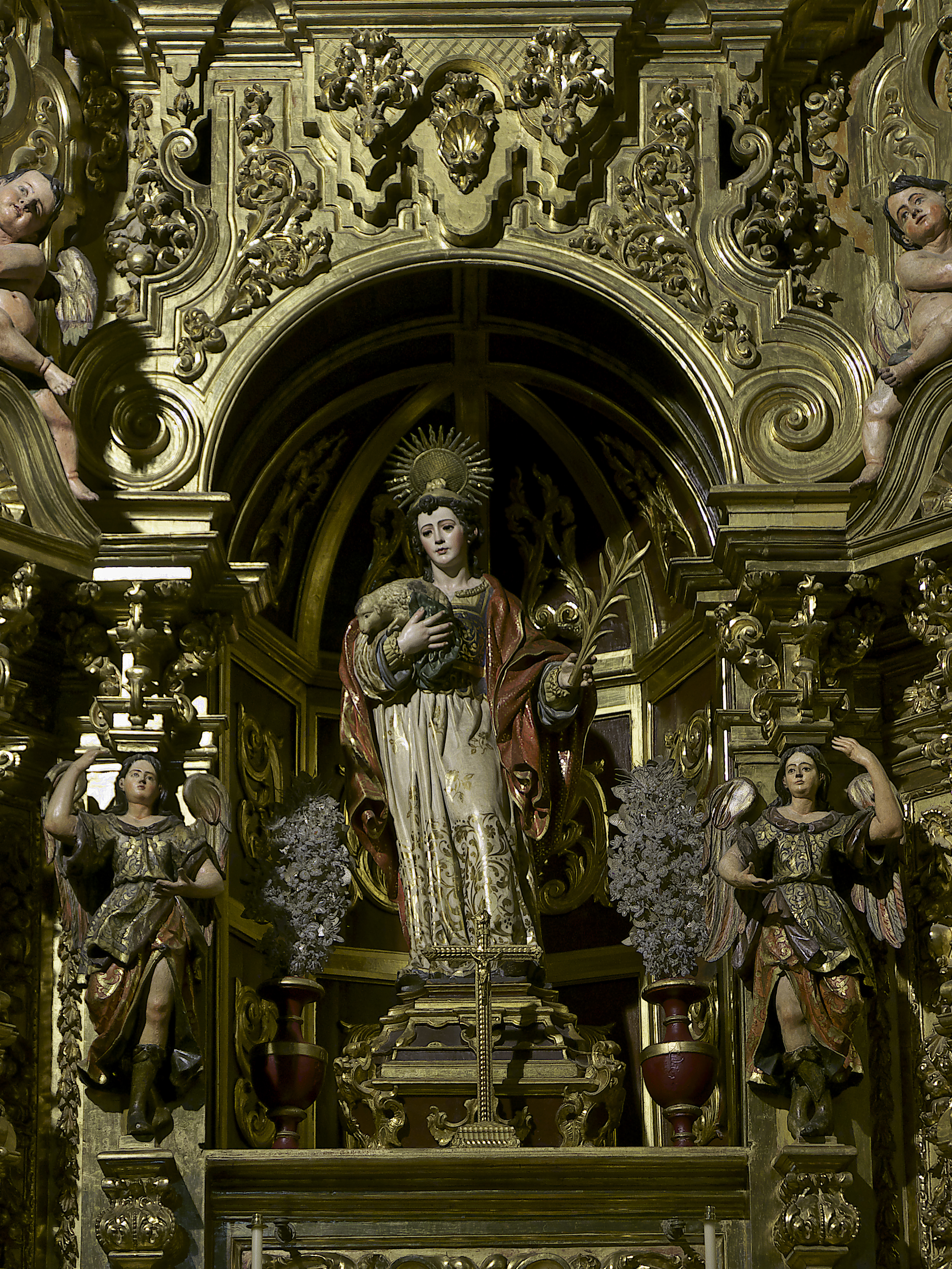 Convento de Santa Inés (Sevilla). Imagen de Santa Inés que preside el actual retablo mayor de la iglesia conventual. Escultura (1628-1630) de Francisco de Ocampo y Felguera. Procede de un anterior retablo de la iglesia.